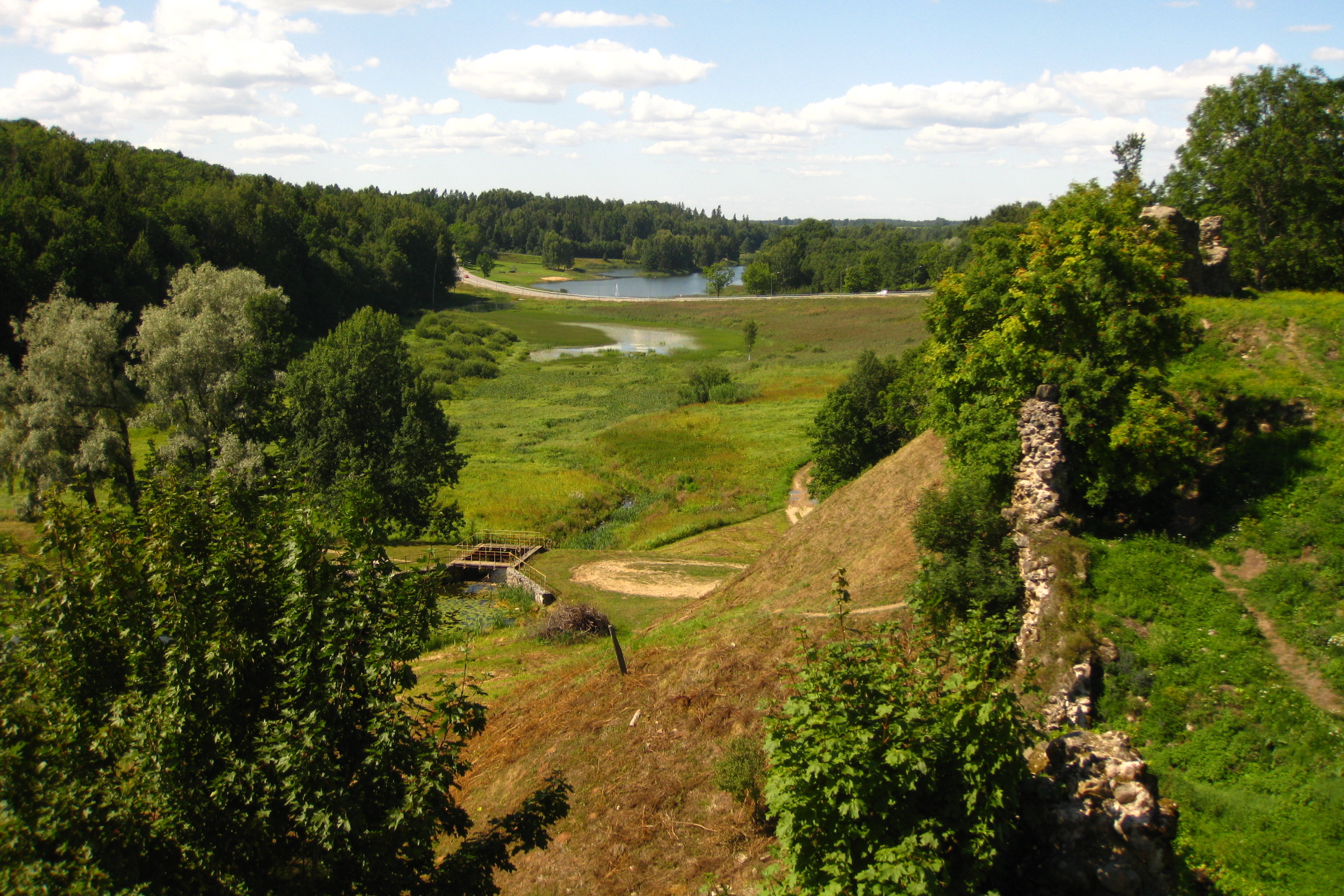 Halliste ürgorg Karksi linnamäelt, Karksi maastikukaitseala